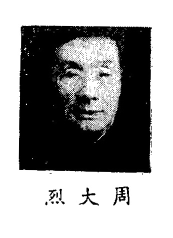 中文（中国大陆）: 制憲國民大會代表